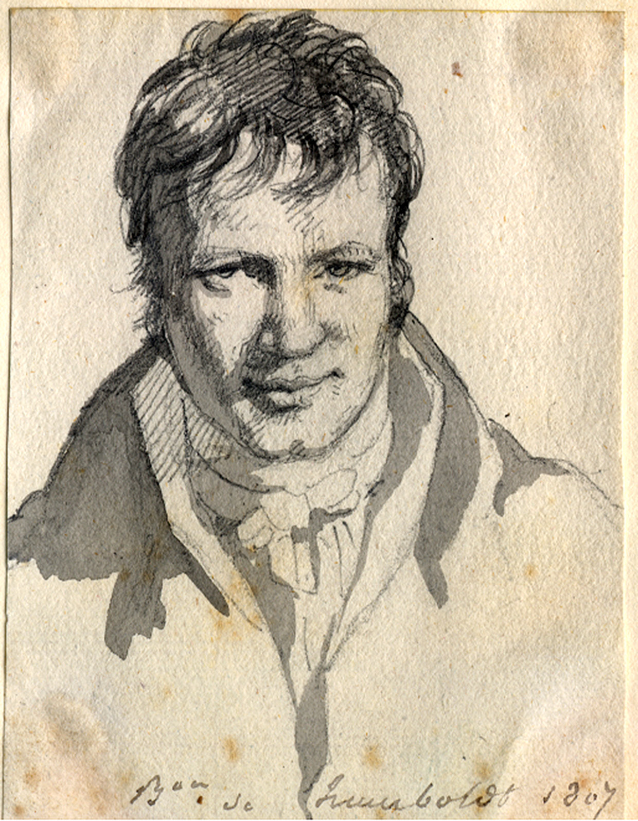 Alexander von Humboldt, in Berlin 1807, Bleistift und Tusche